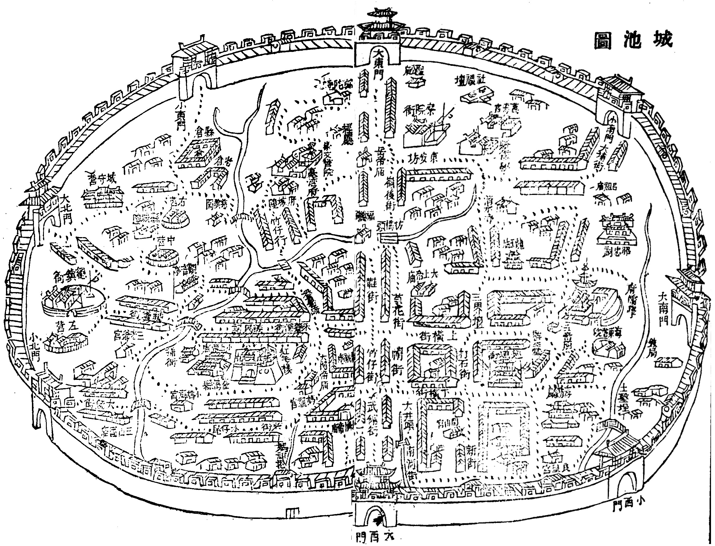 臺灣縣城池圖，從臺灣文獻叢刊擷取下來，將左右兩頁合為一幅圖，並將中間的黑線修飾消除。